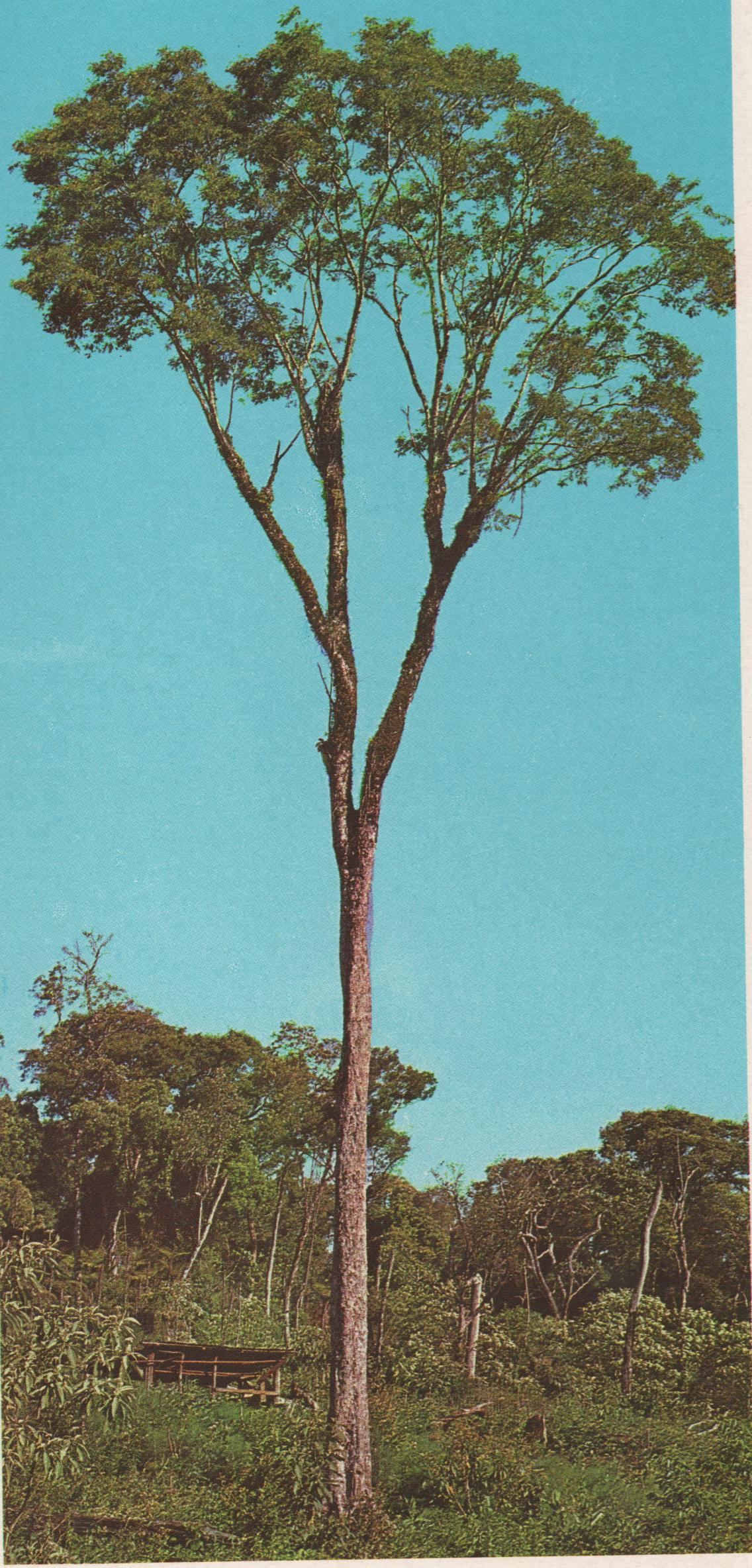 Ejemplar de Parapiptadenia rigida, en Argentina.